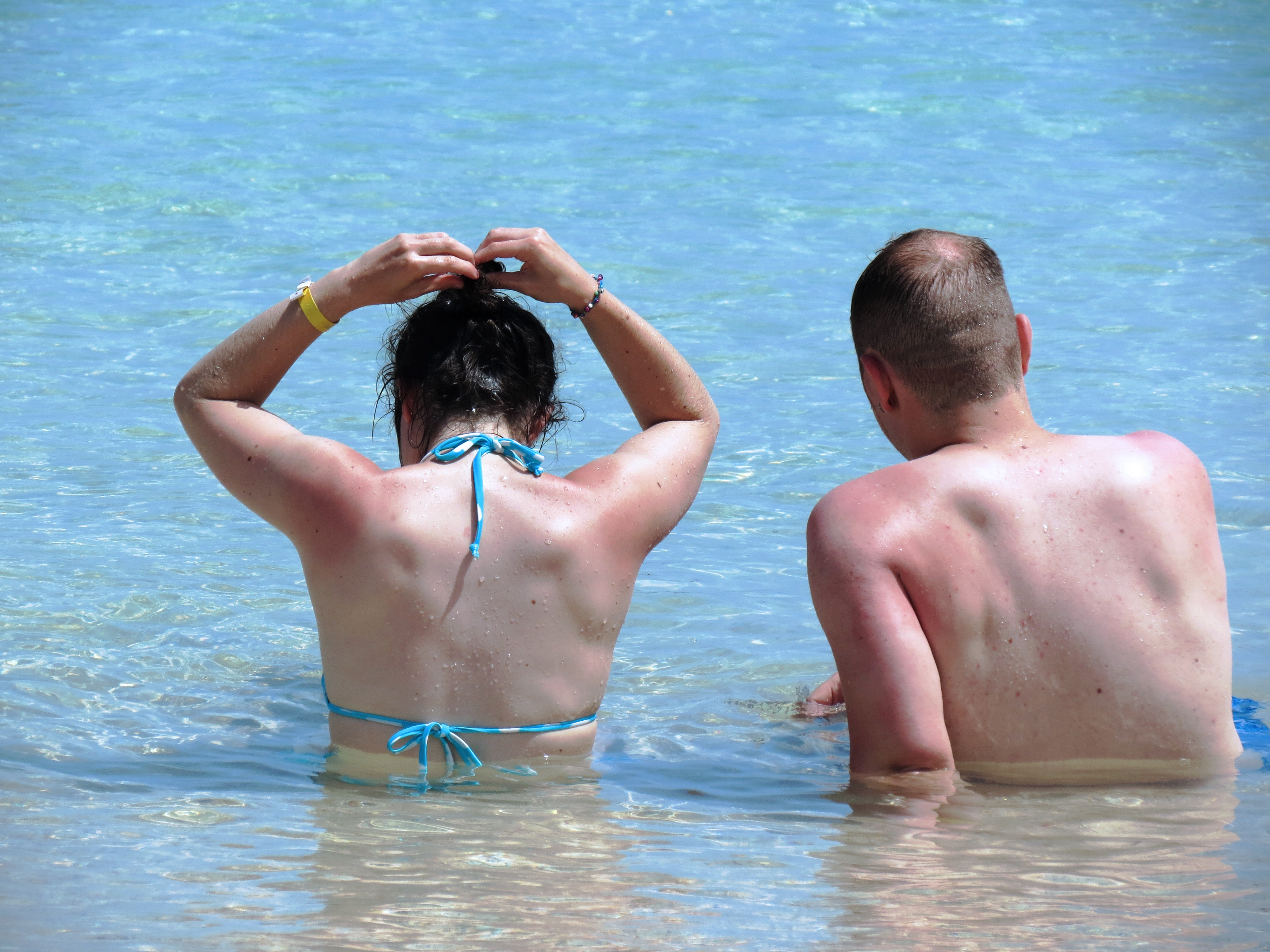 Prekomjerno izlaganje suncu može izazvati hiperpigmentaciju